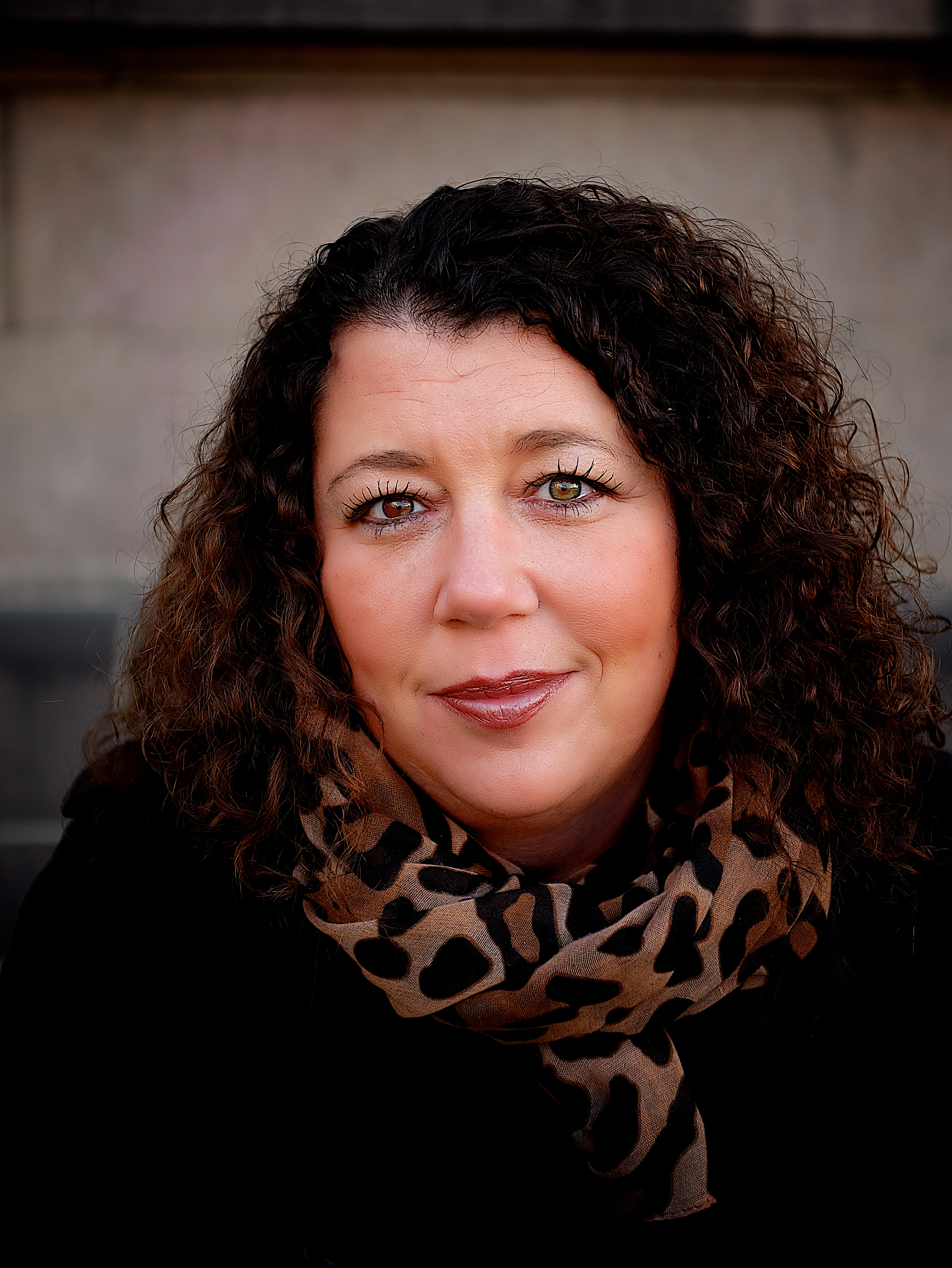 Kristin Oudmayer. Fotograf: Arnfinn Petterson